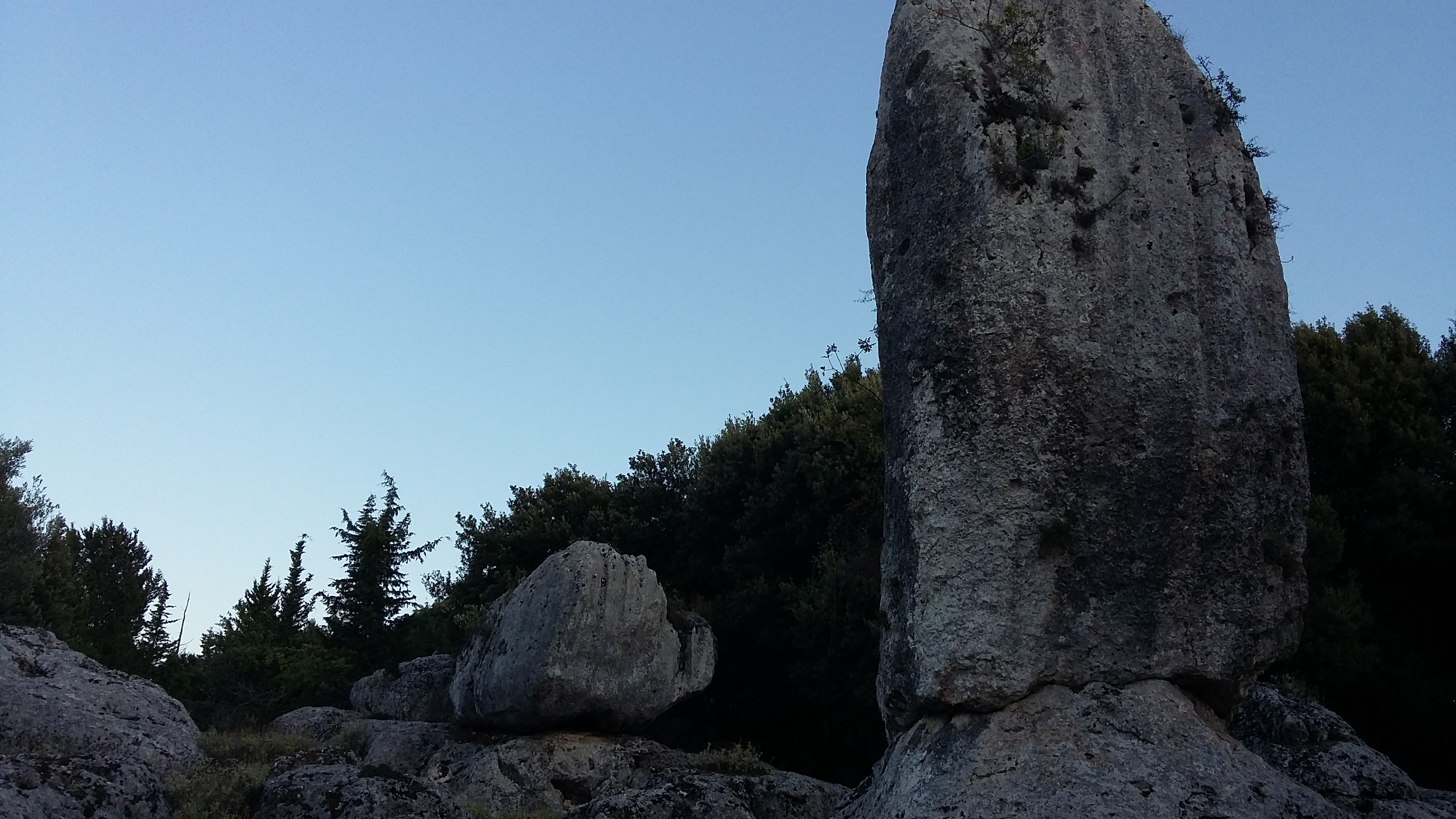 Ευρύτερη περιοχή Ανωγής, Βράχος σε σχήμα Μενίρ